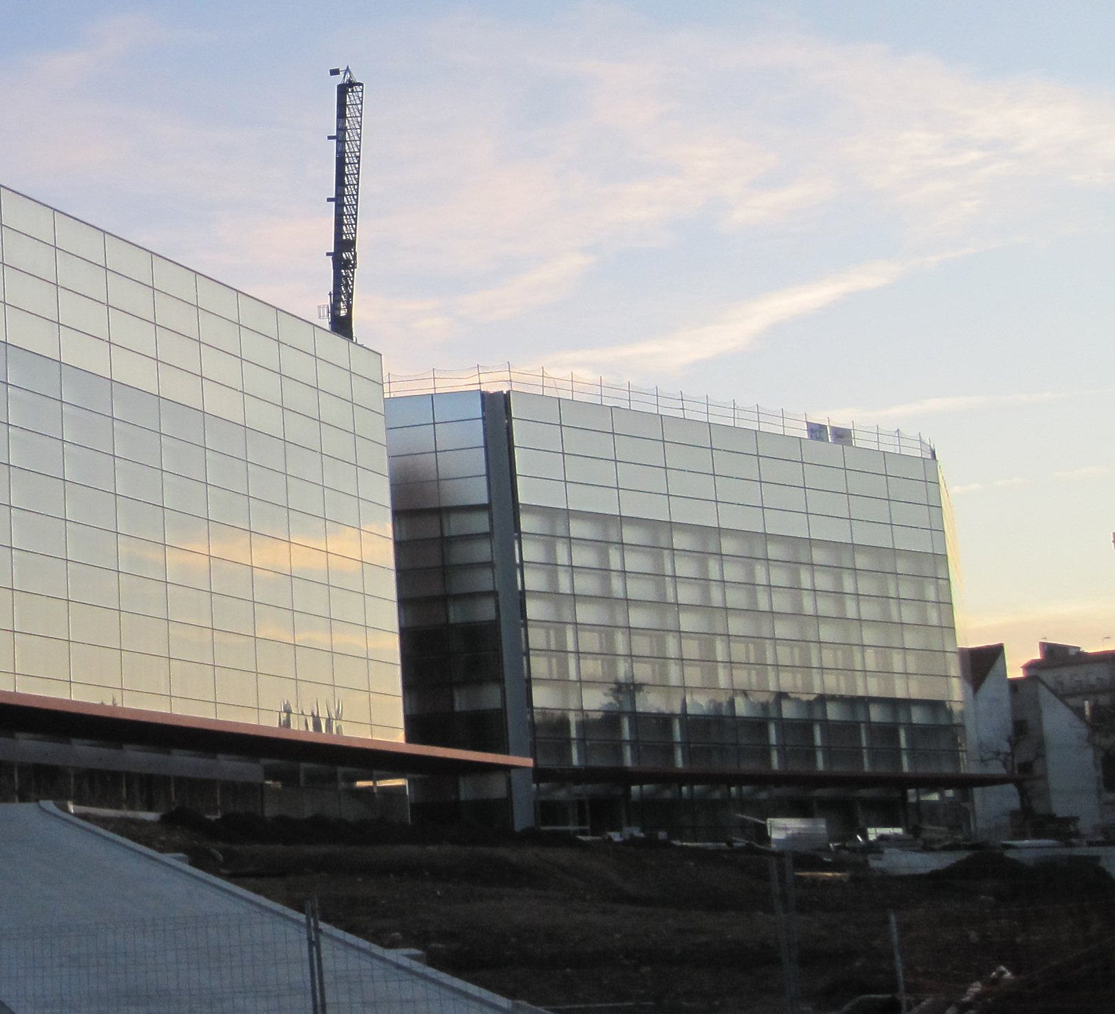 Obras del auditorio y palacio congresos burgos.